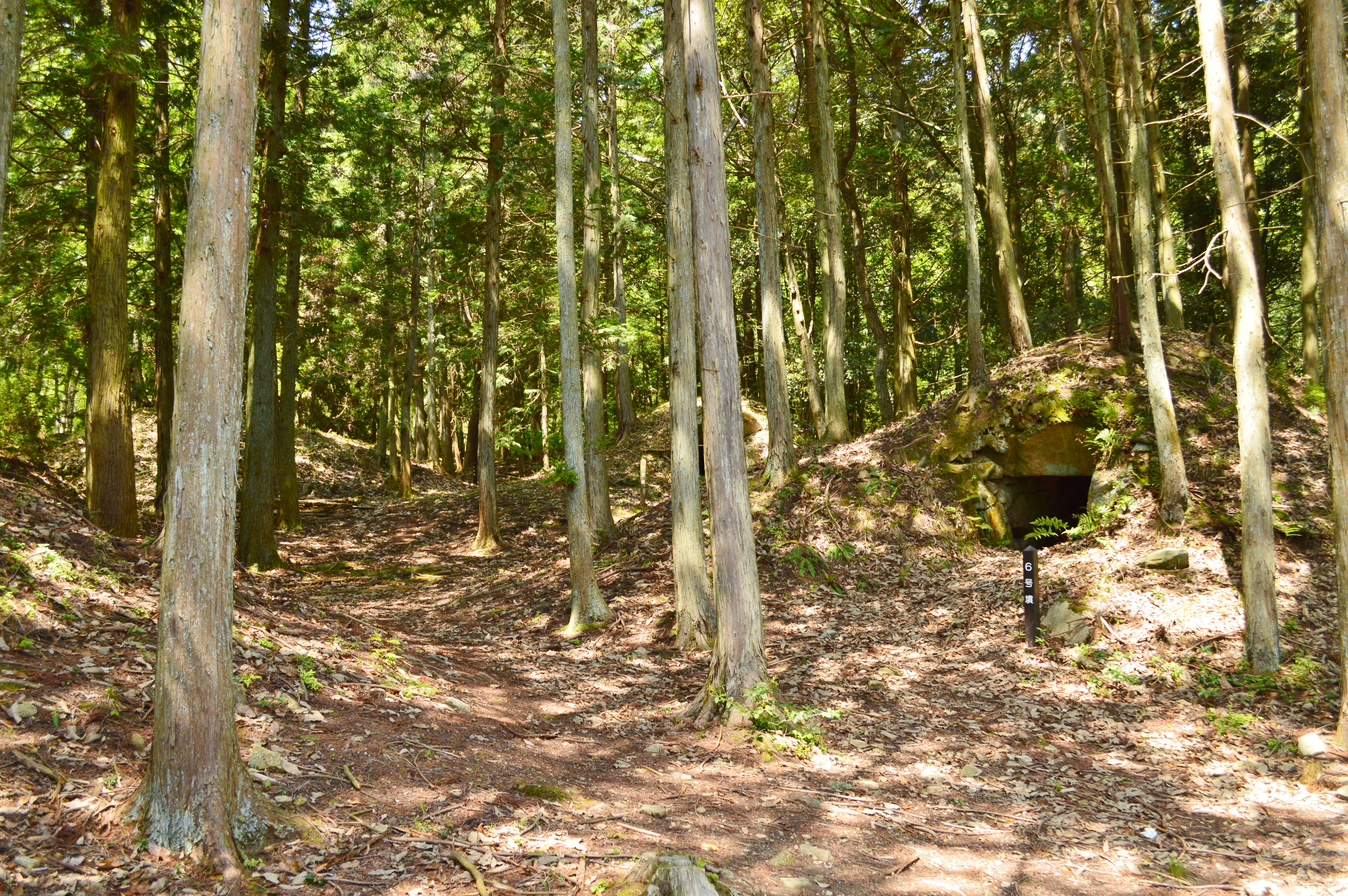 馬立古墳群のうち数基